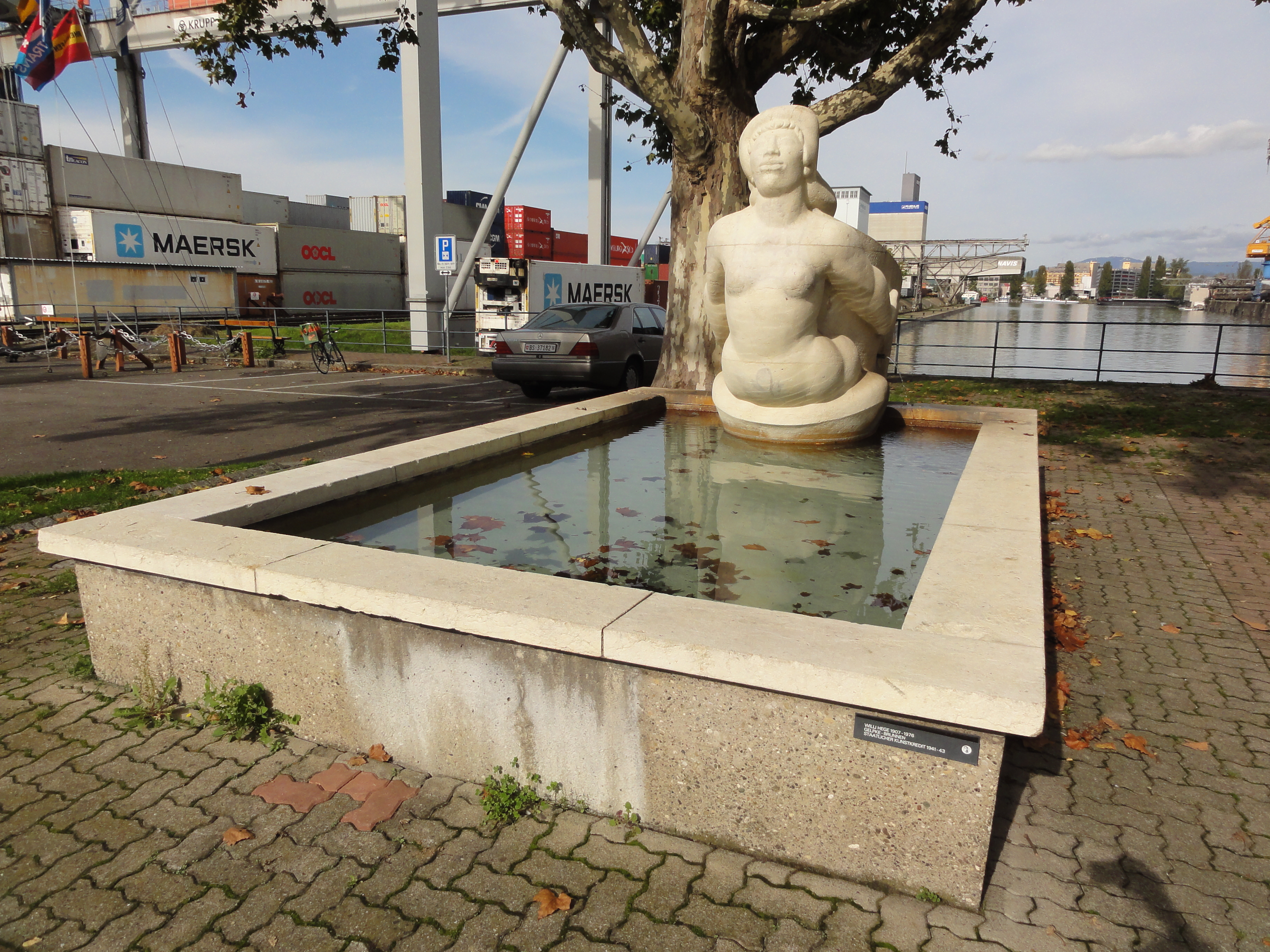 Basel — Hafen